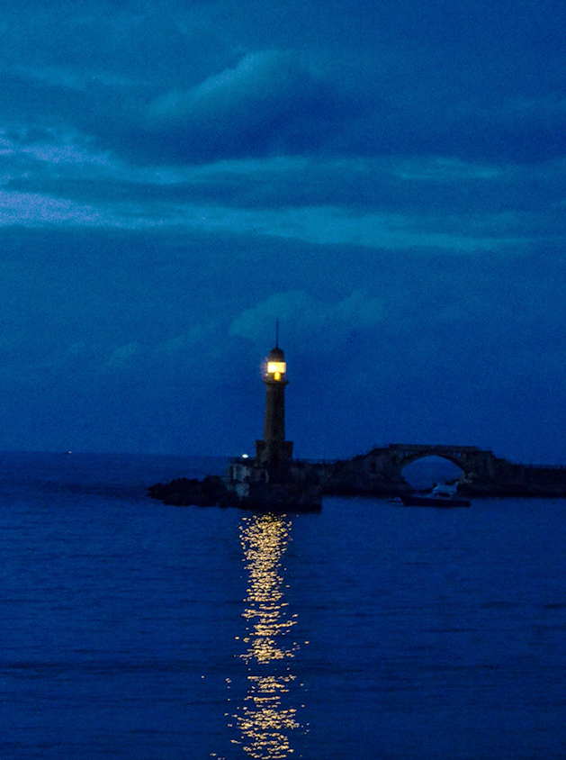 فنار المنتزه ليلا في الاسكندرية